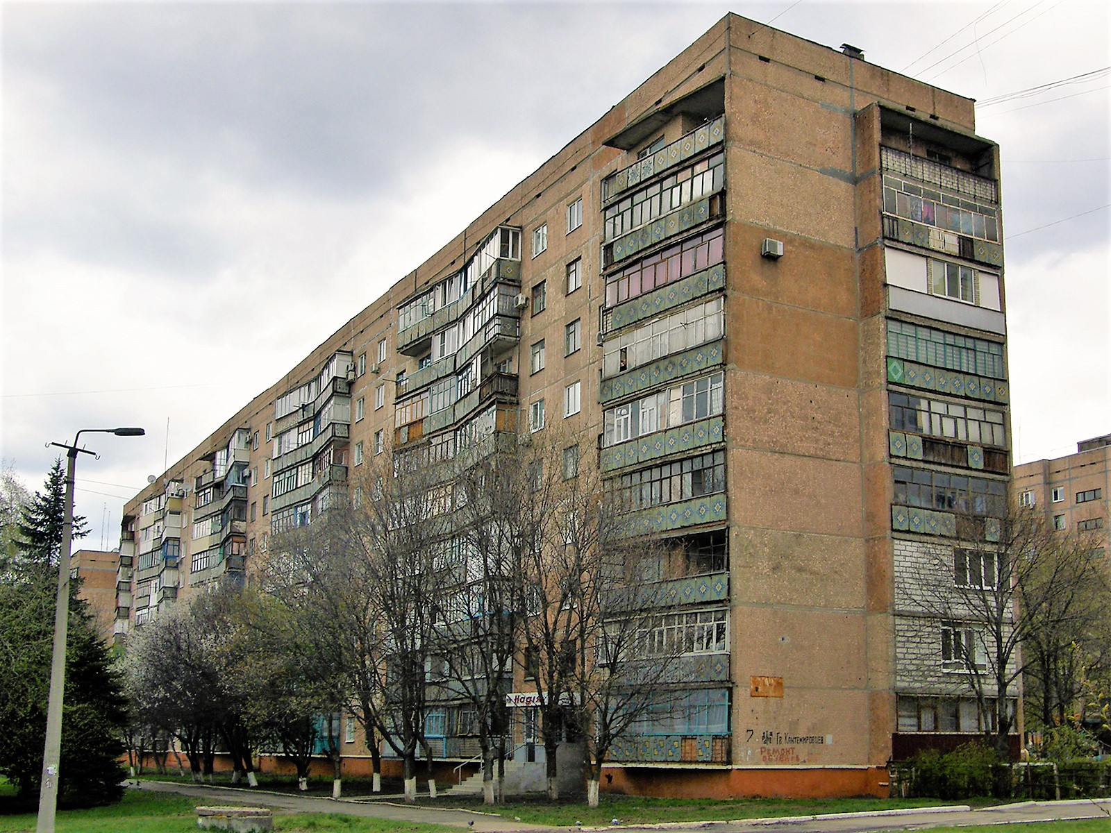 улица Марии Приймаченко, 7